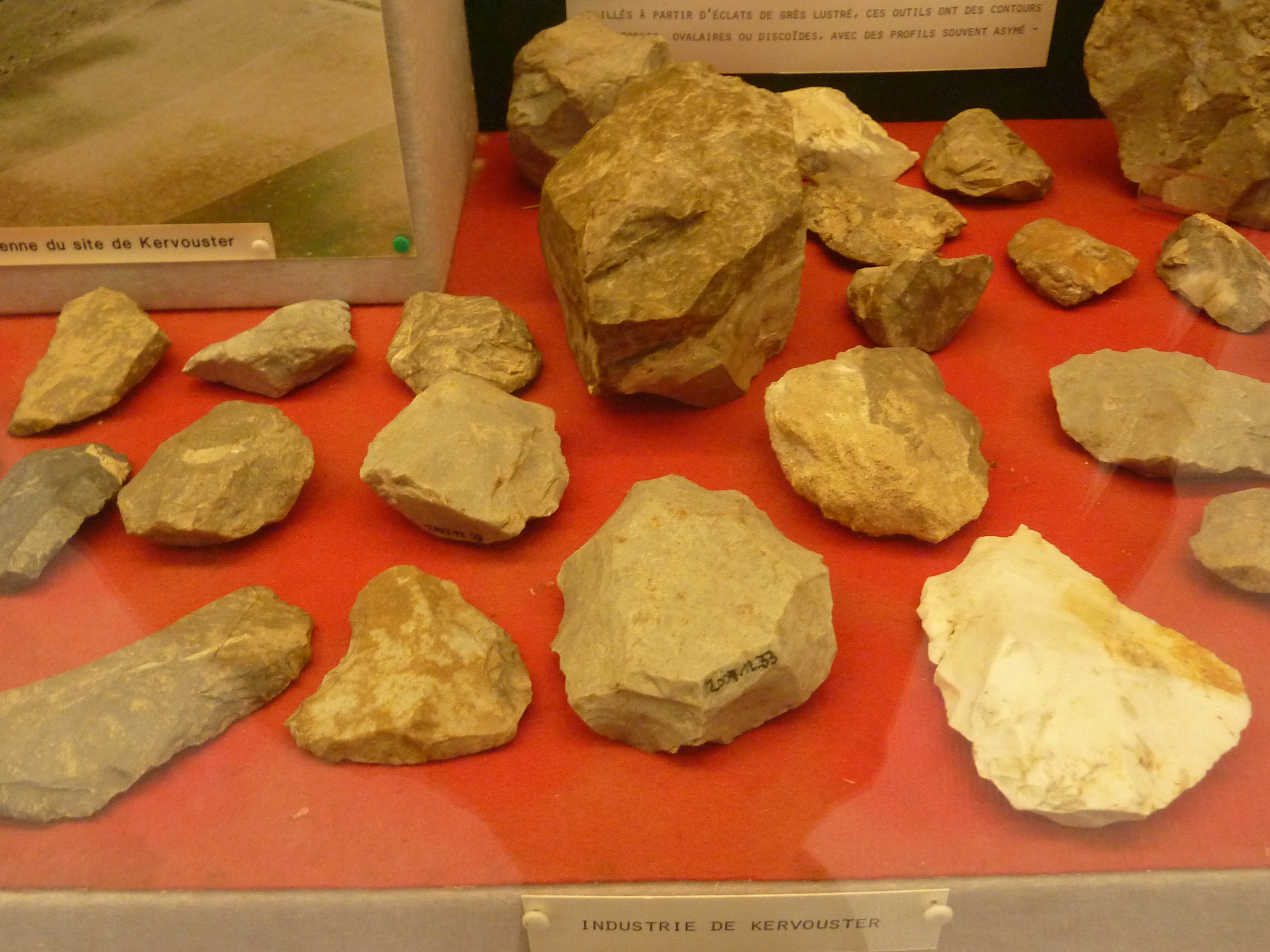 Industrie lithique trouvée à Kervouster en Guengat (musée de la préhistoire finistérienne de Penmarc'h)